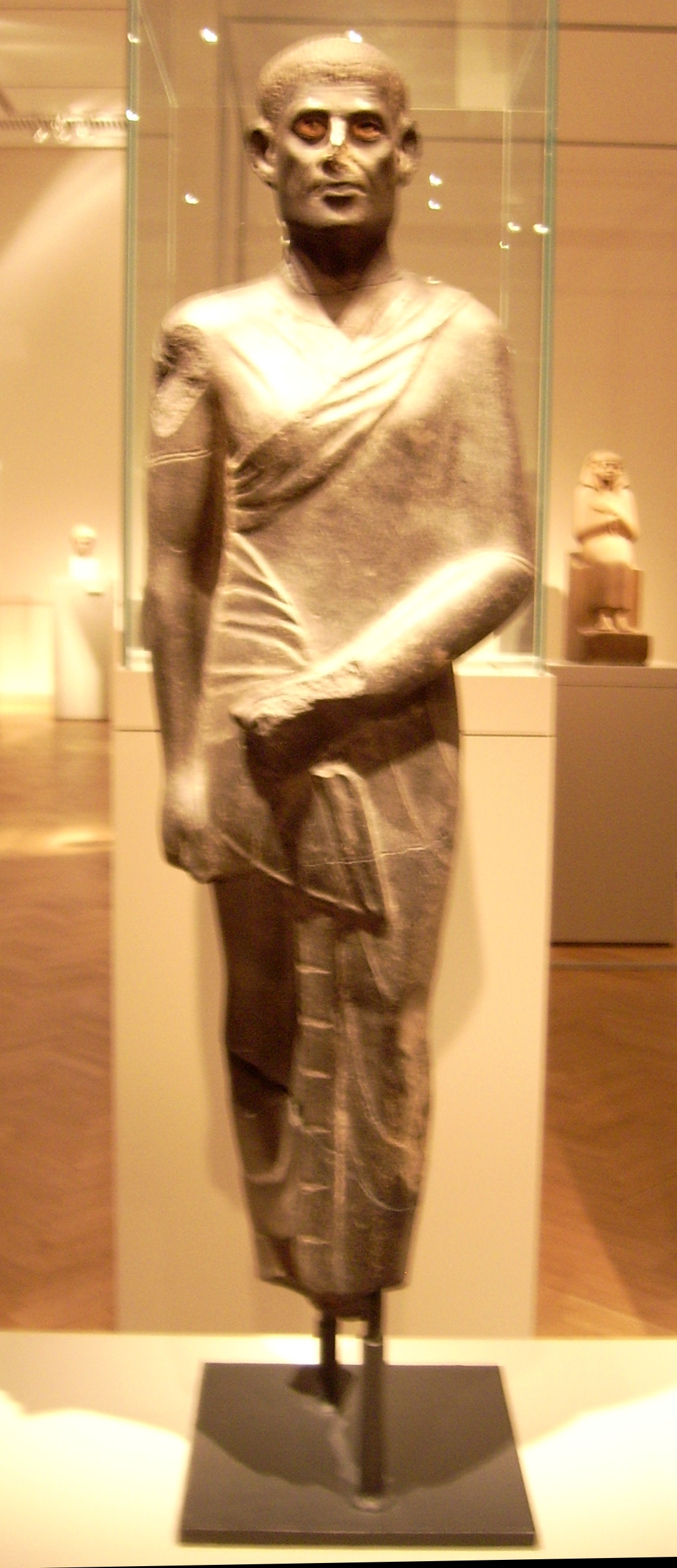 Standschreitfigur eines Mannes; Frührömisch, um 20 v. Chr.; Granit; Ägyptisches Museum/Altes Museum, Inv.-Nr. 11632